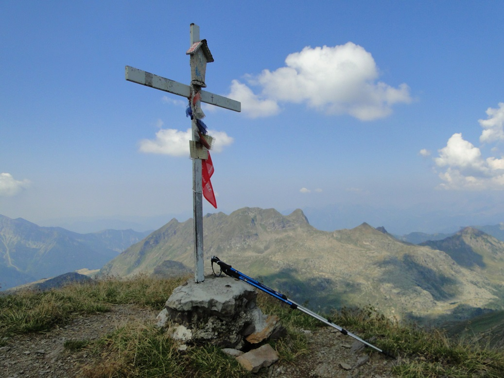 Pizzo Farno, Prealpi bergamasche (BG). Croce di vetta